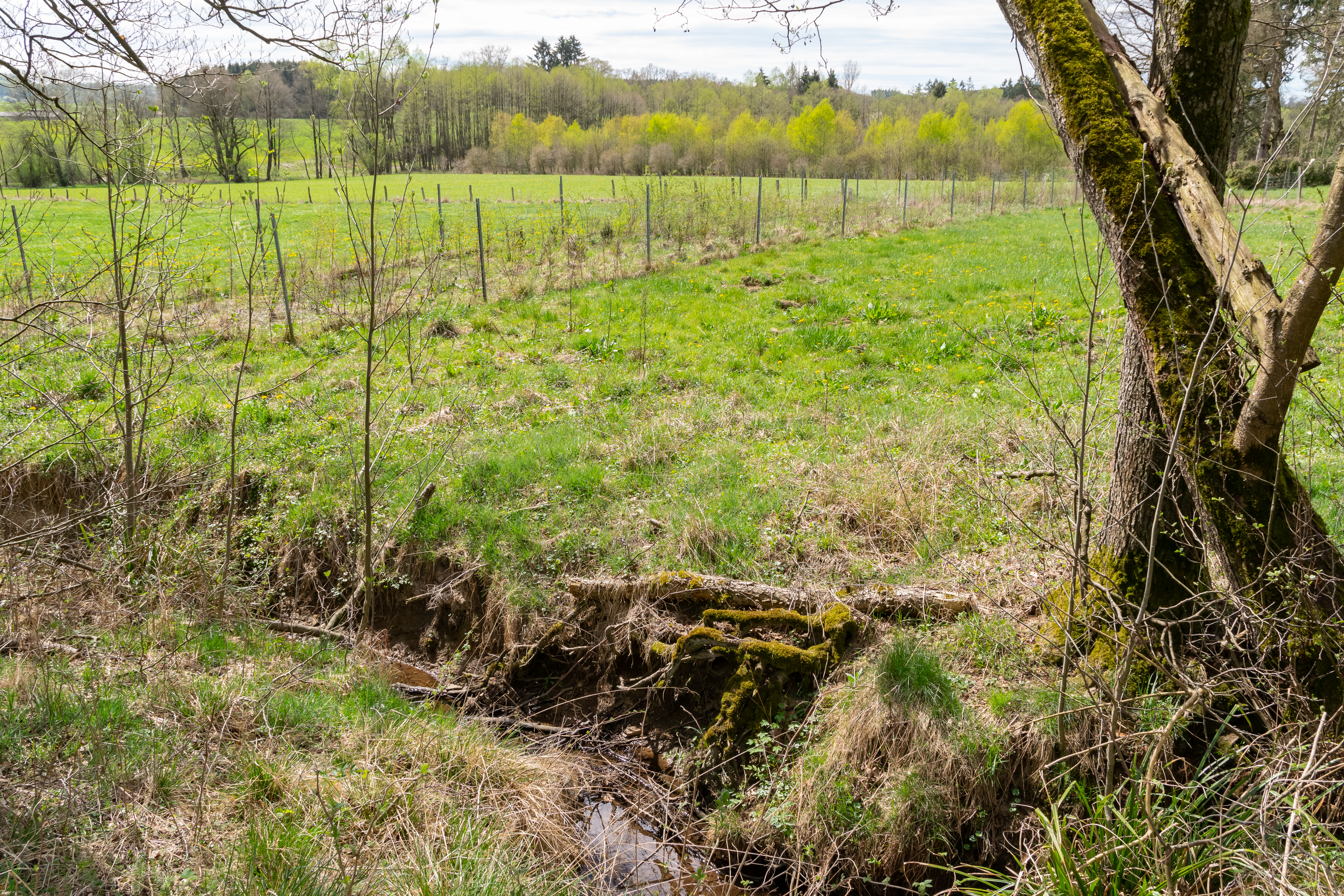 Lanschaftsschutzgebiet "FFH-Gebiet Leiberger Wald" in Bad Wünnenberg, Kreis Paderborn